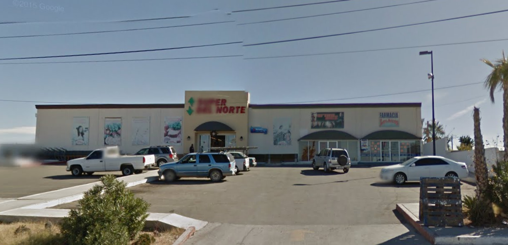 Sucursal Santa Ana